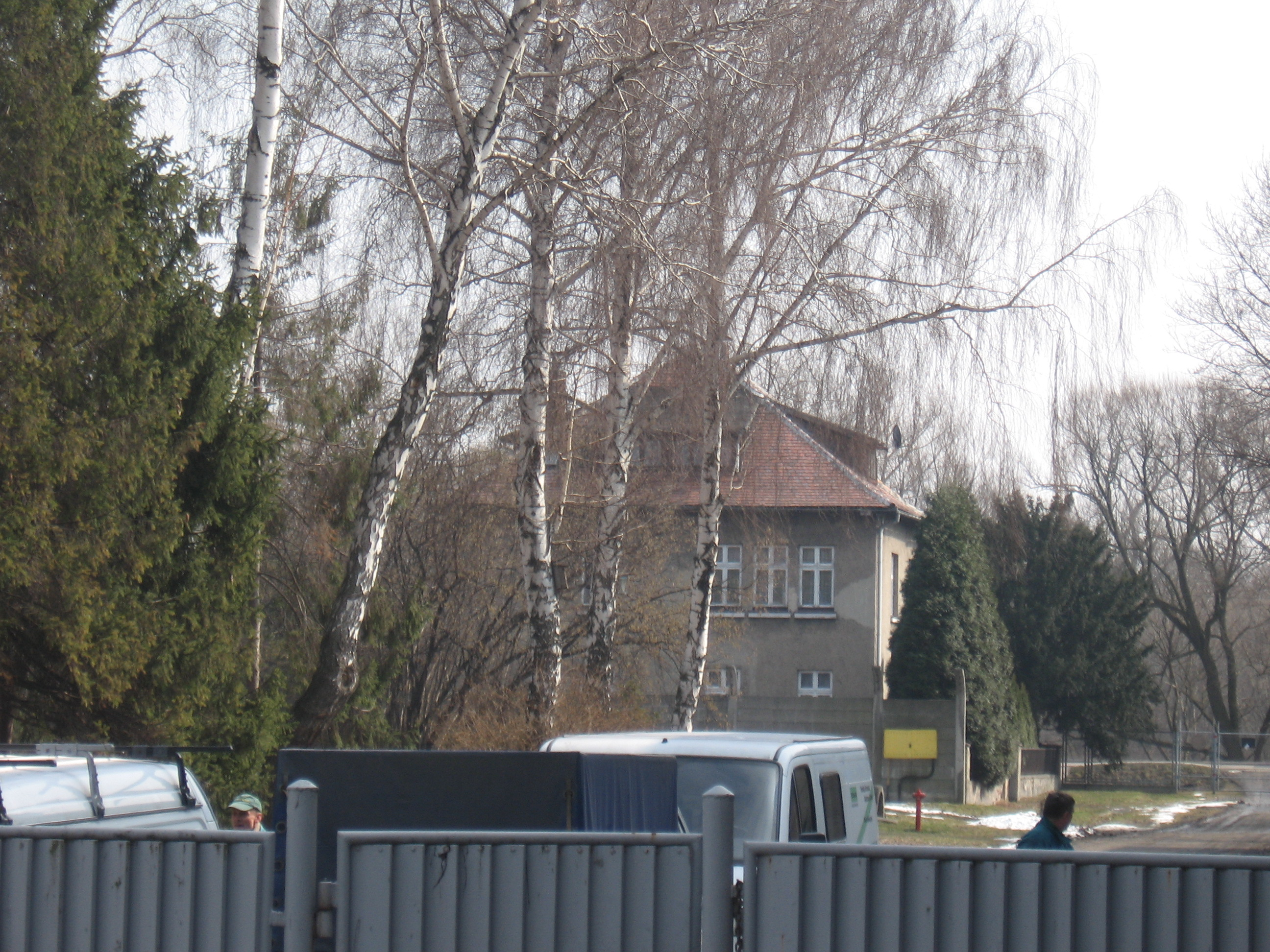 הבית שבו התגוררו רודולף פרנץ הס ומשפחתו ליד מחנה אושוויץ 1